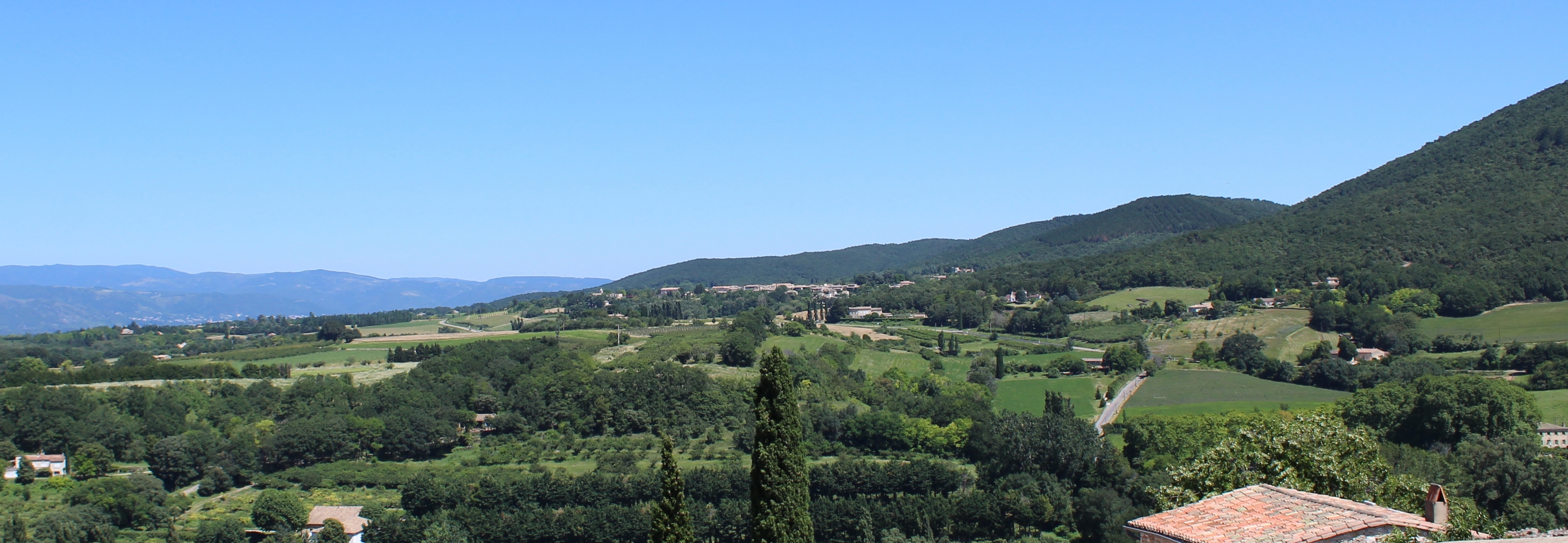 Panorama depuis le village de Mirmande.